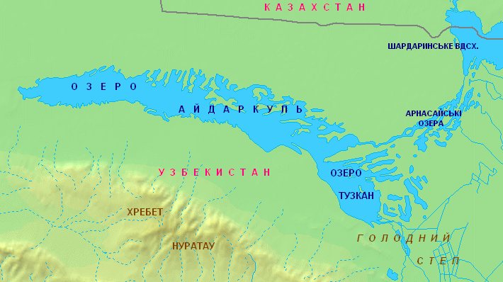 Айдар-Арнасайські озера